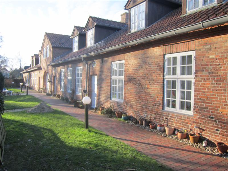 Deitsch: Die dänischen Seniorenwohnungen in Bredstedt